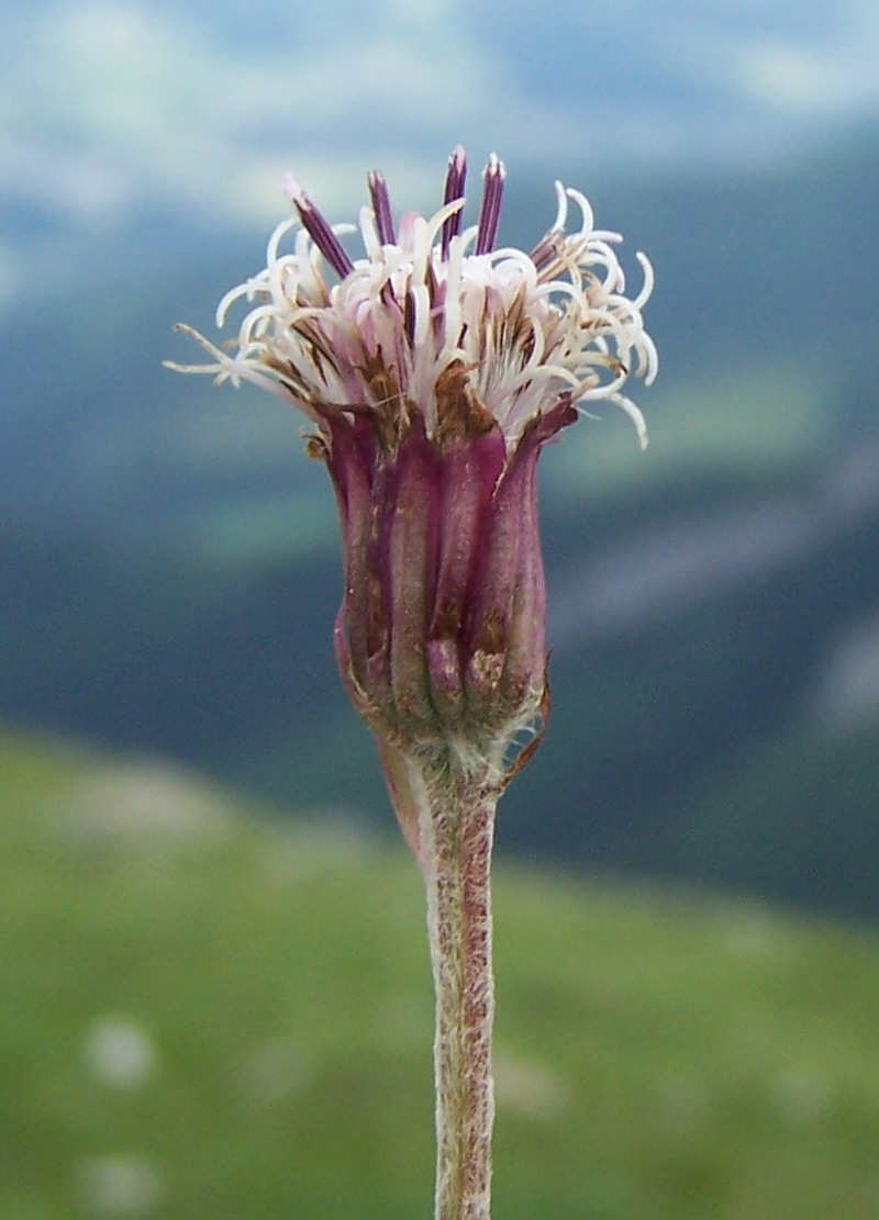 Homogyne alpina (pl. podbiałek alpejski), habitat: West Tatra Mountains, Małołączniak